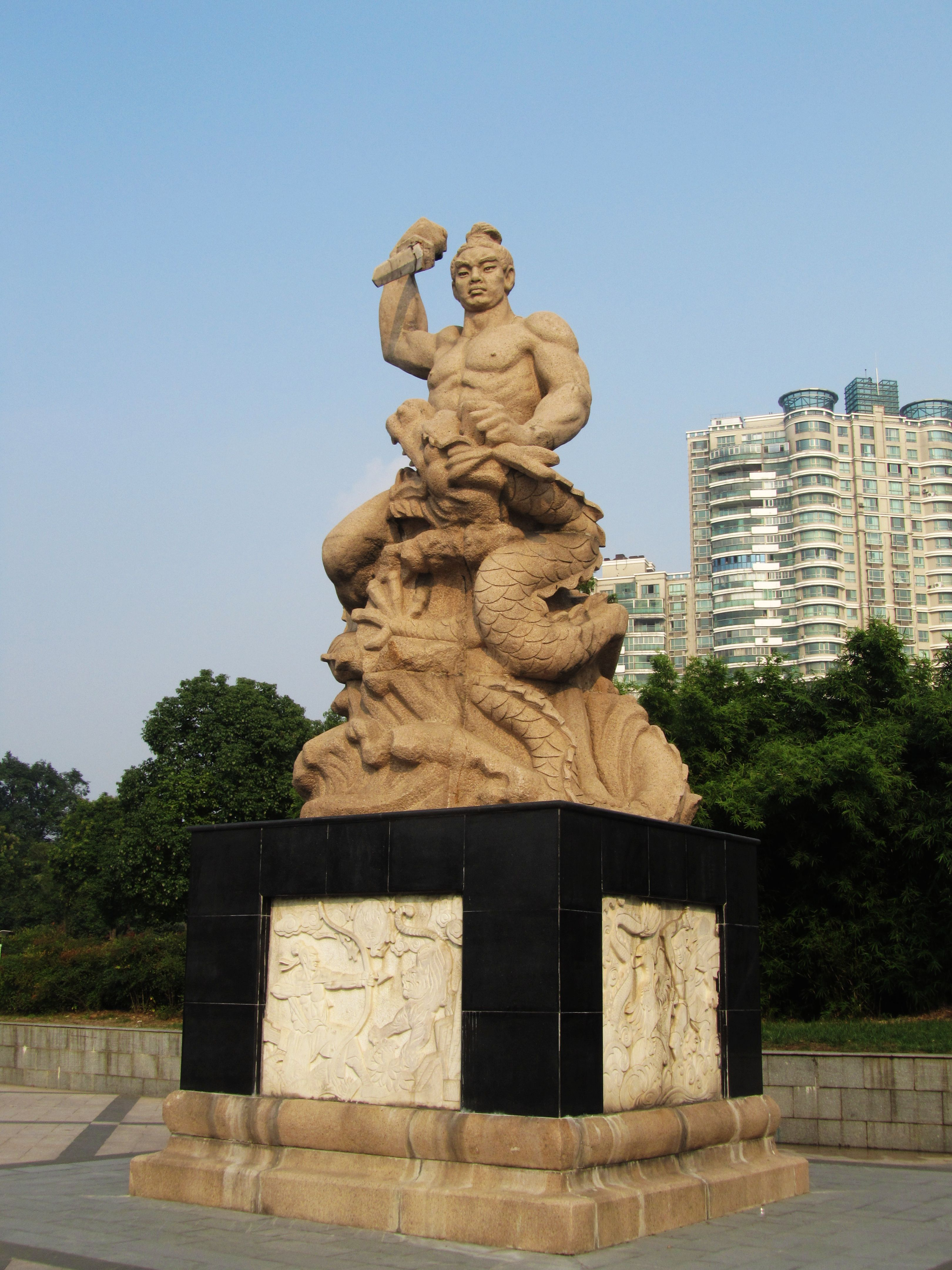 周处像，位于宜兴市团氿东岸、新蛟桥西北侧（原在东山路与荆溪路交叉口），建于二十世纪九十年代初。